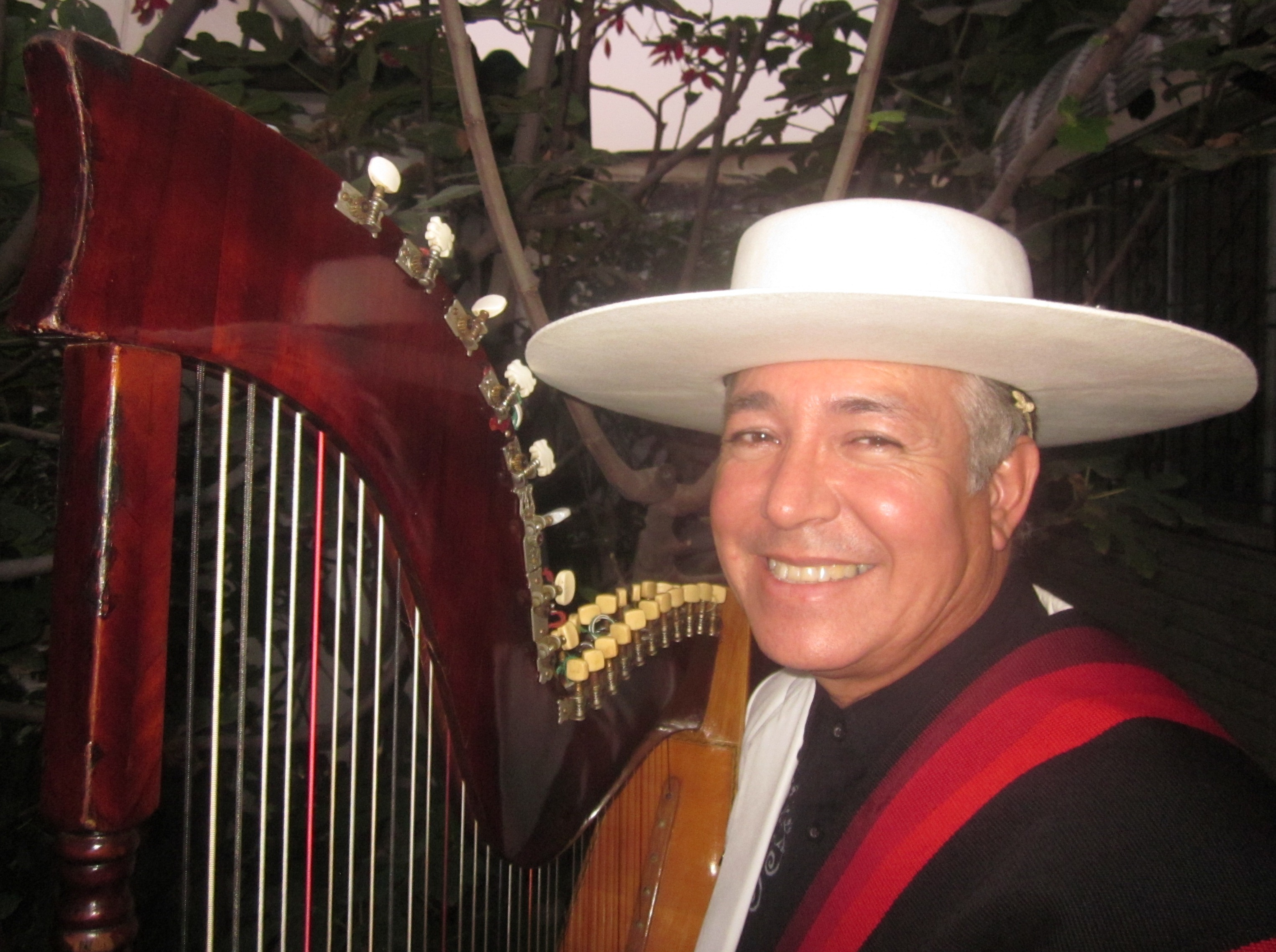 ERNESTO GUERRA, ARPISTA Y FOLKLORISTA CHILENO